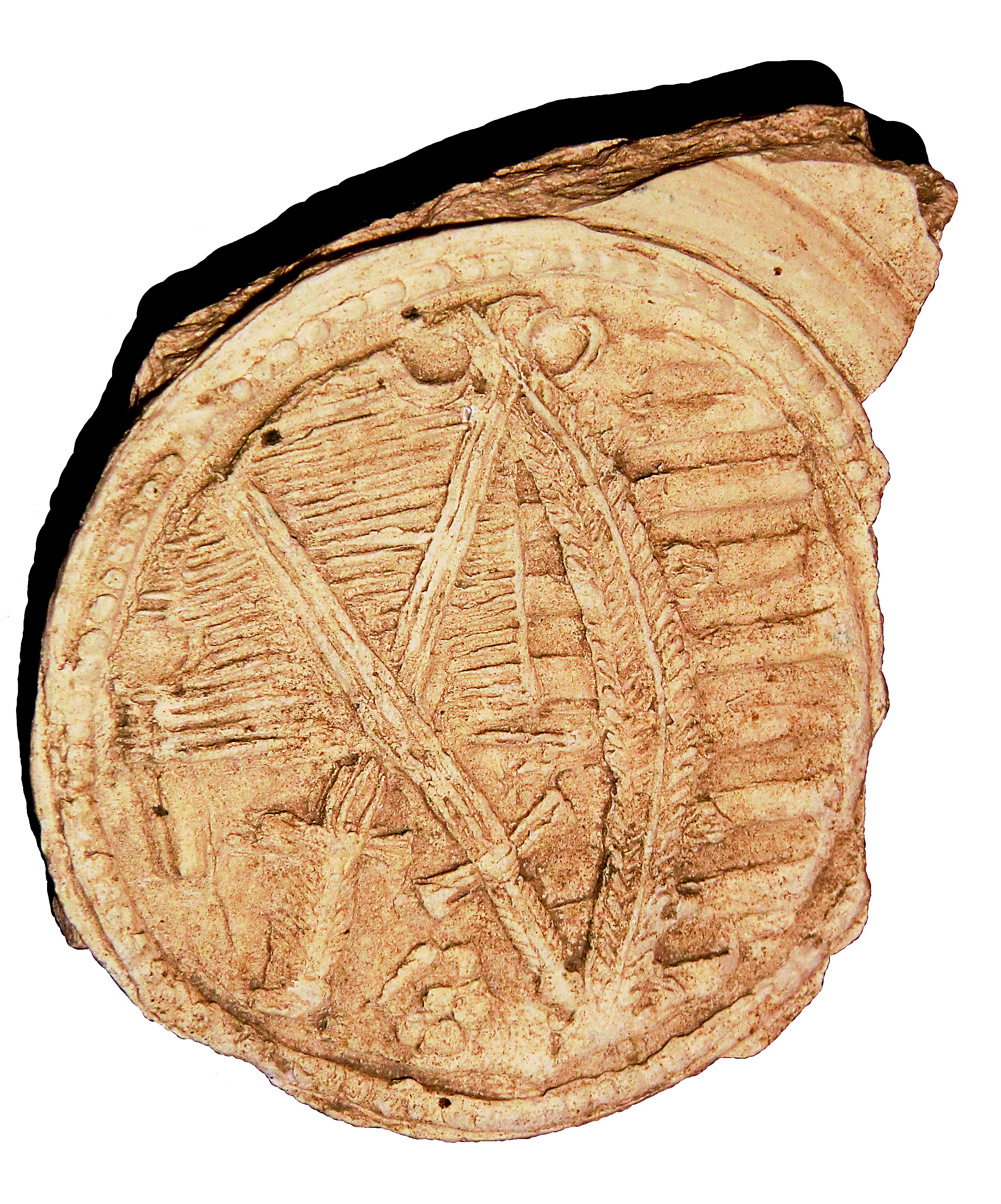 Krugfragment mit kleinem Wappen aus Gschaid